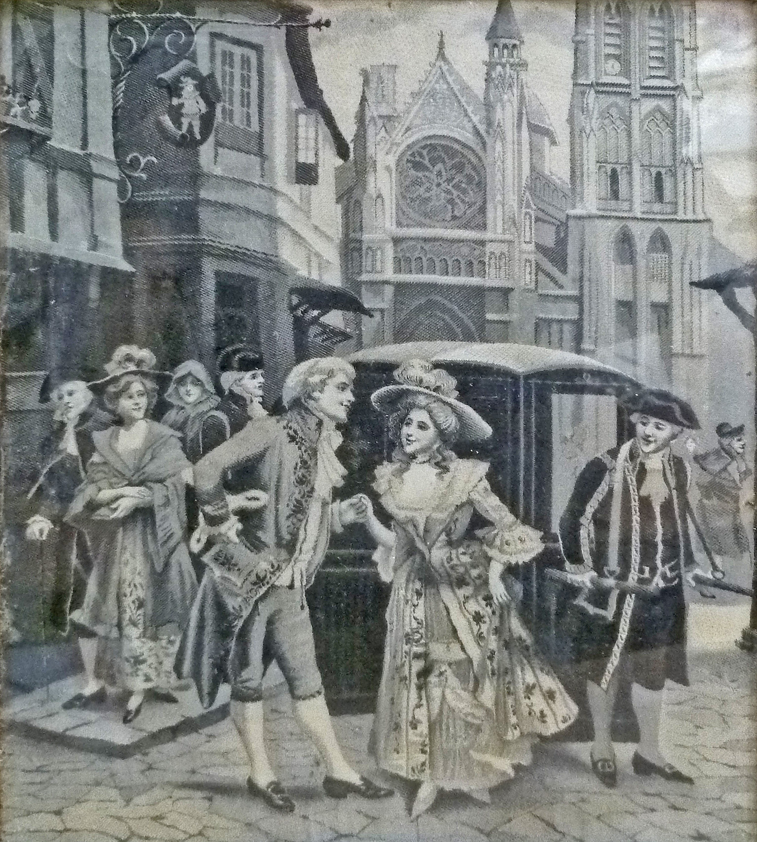 "La charmante rencontre", zeldzaam 18de-eeuws borduurwerk in zijde (soie de Lyon) (27 x 23 cm); anonieme kunstenaar; privébezit